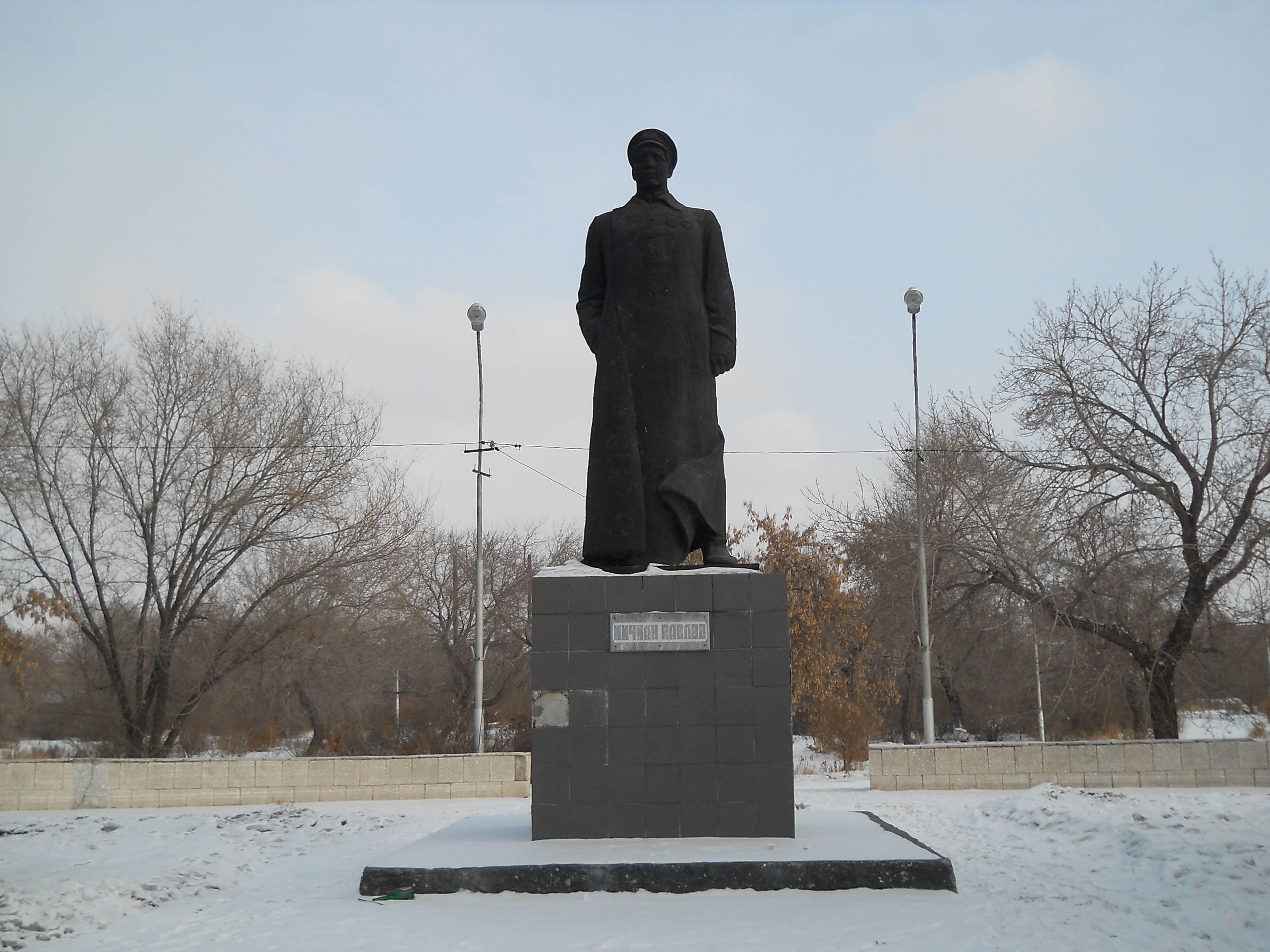 Памятник мичману Павлову, ранее на этом месте была одна из торговых точек продажи пивоваренной продукции завода Зуккера (перекрёсток улиц Гагарина и Климова г. Троицка).